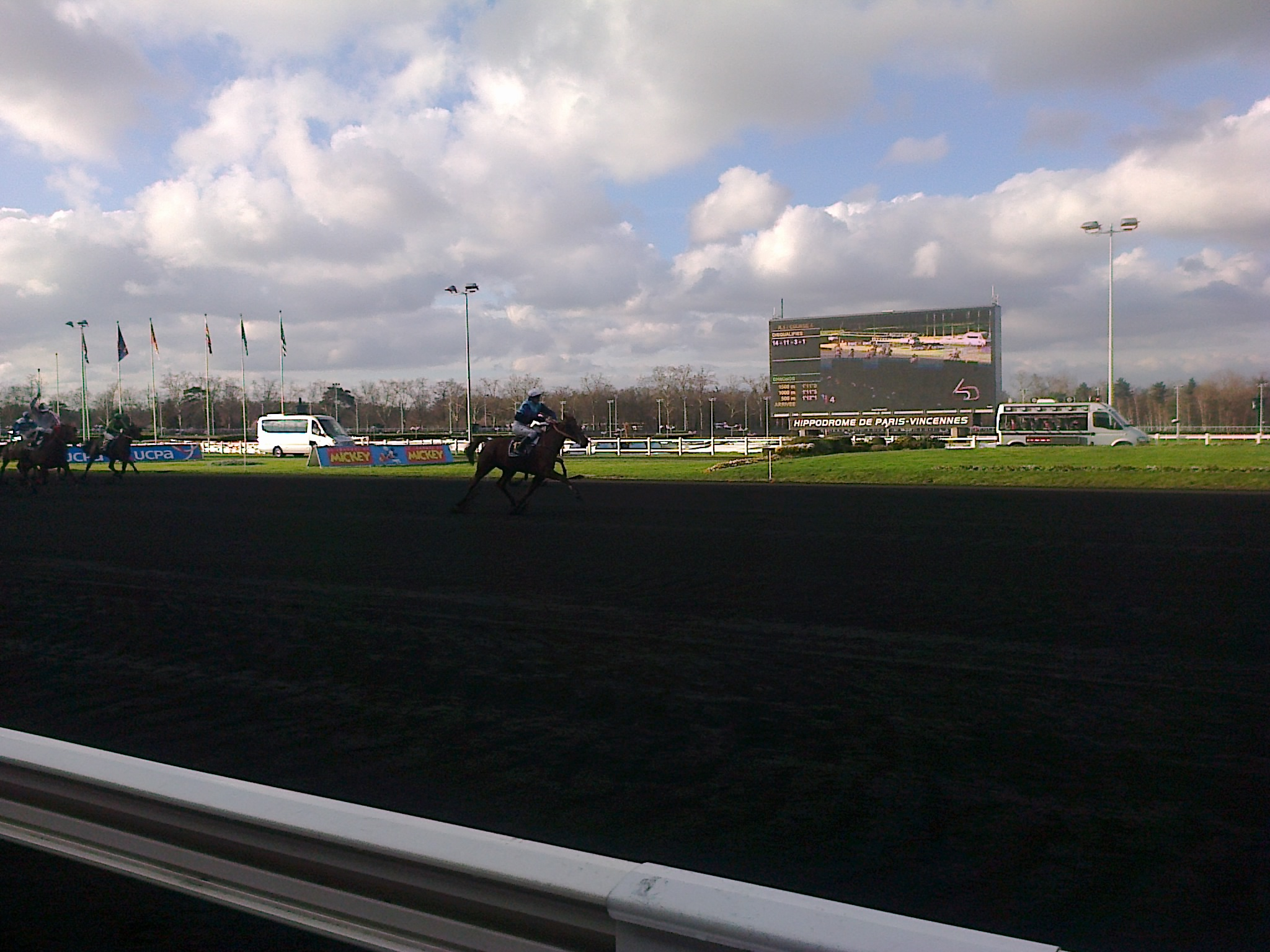 Victoire de Roxane Griff (casaque ciel et bleu) montée par Eric Raffin dans le prix du Cornulier 2014.